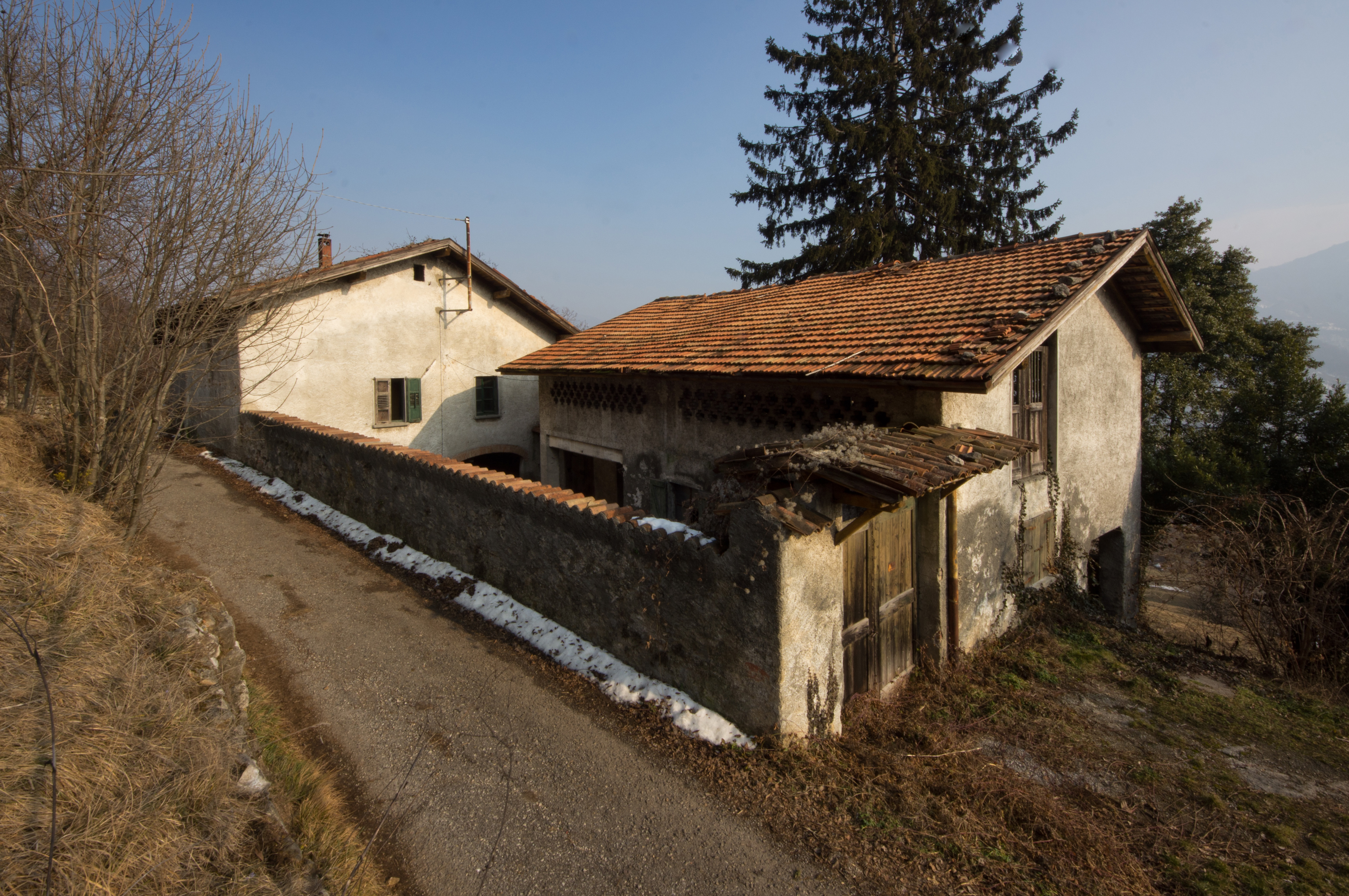 Cascina rurale presso Piazzo di Albino (Bergamo)